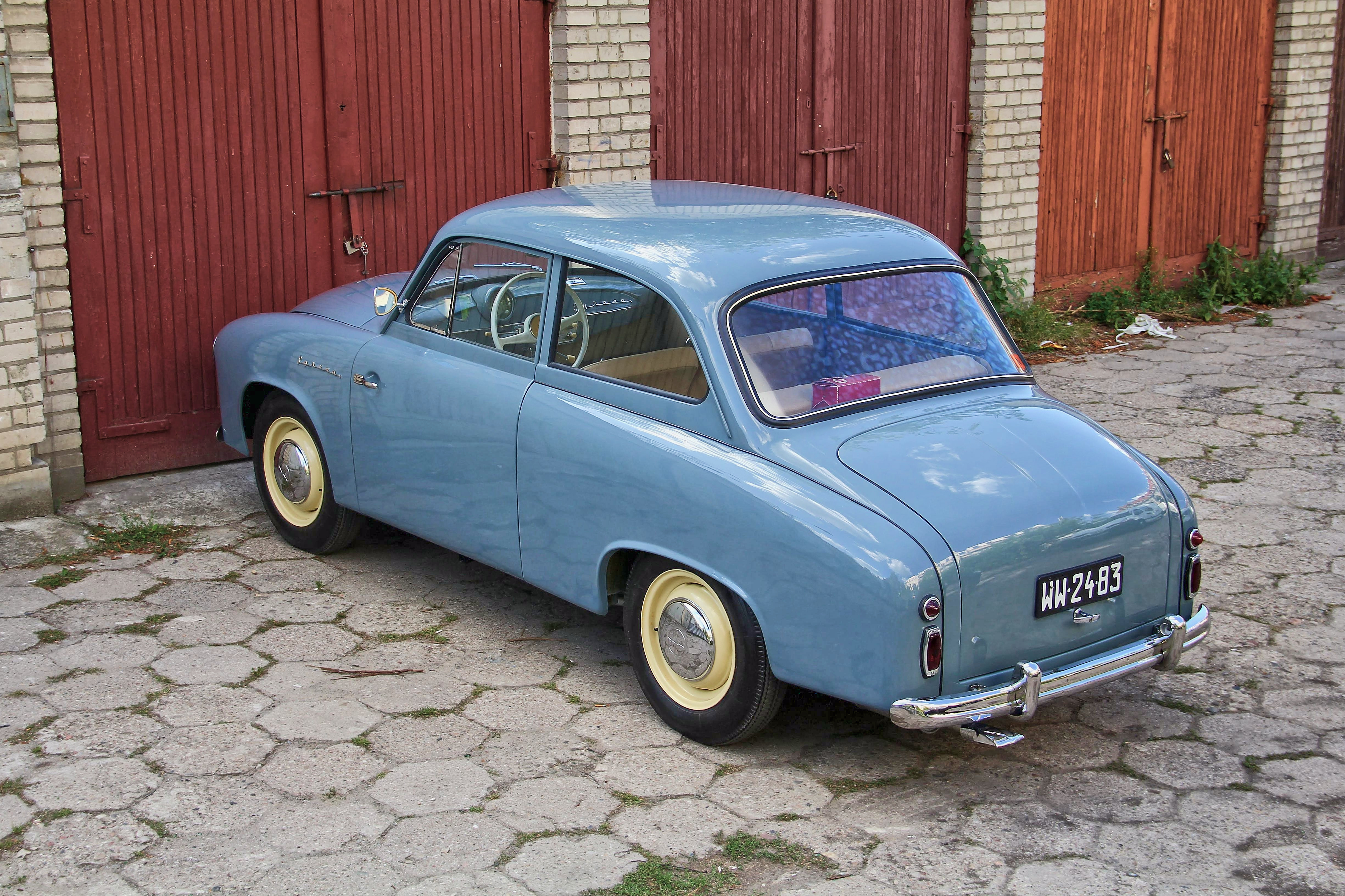 FSO Syrena 100 z 1960 roku. Widok z tyłu. Charakterystyczne elementy dla tego modelu to brak progów - drzwi podwijane pod podłogę samochodu, brak zewnętrznych listew ozdobnych oraz długa klapa bagażnika.